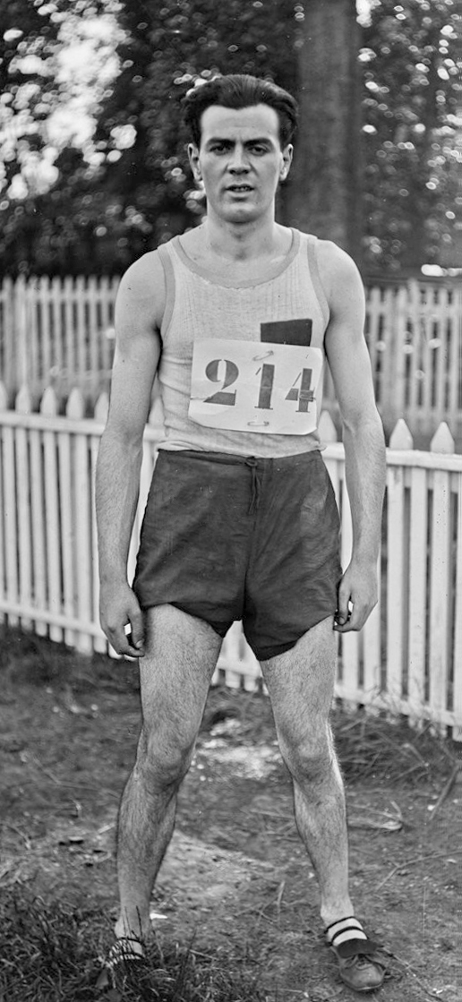 5-6-22, Colombes, [Robert] Duthil [perchiste du Stade bordelais], Grand prix des jeunes : [photographie de presse] / [Agence Rol]